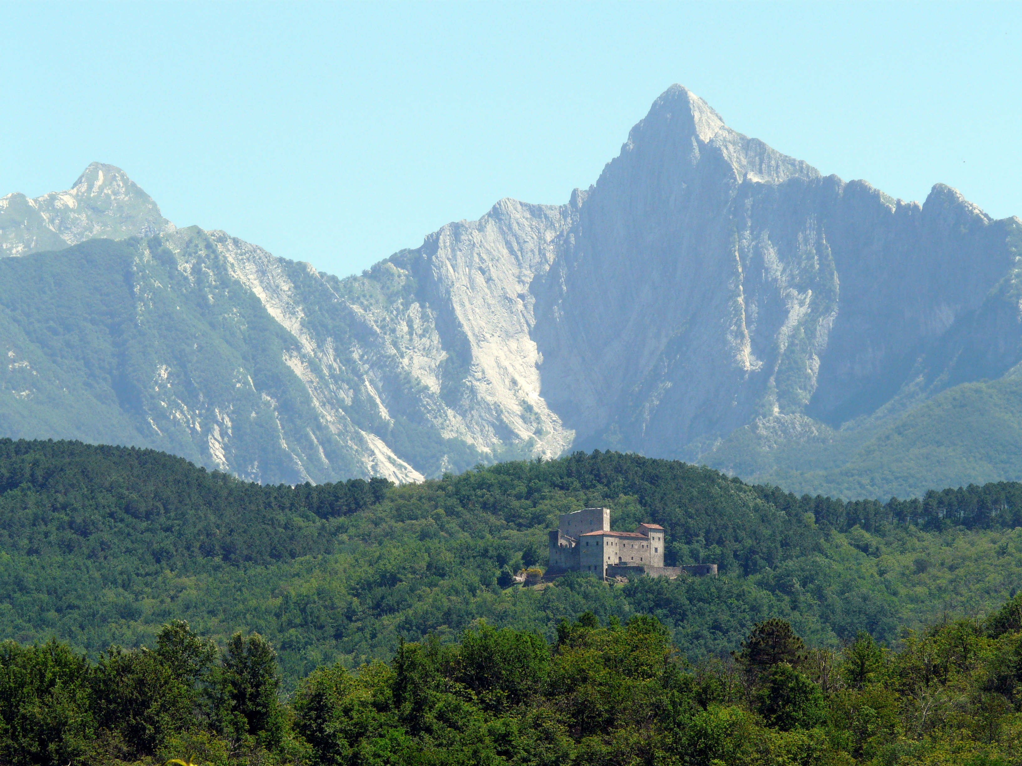 Il castel dell'Aquila, Gragnola, Fivizzano, Toscana, Italia